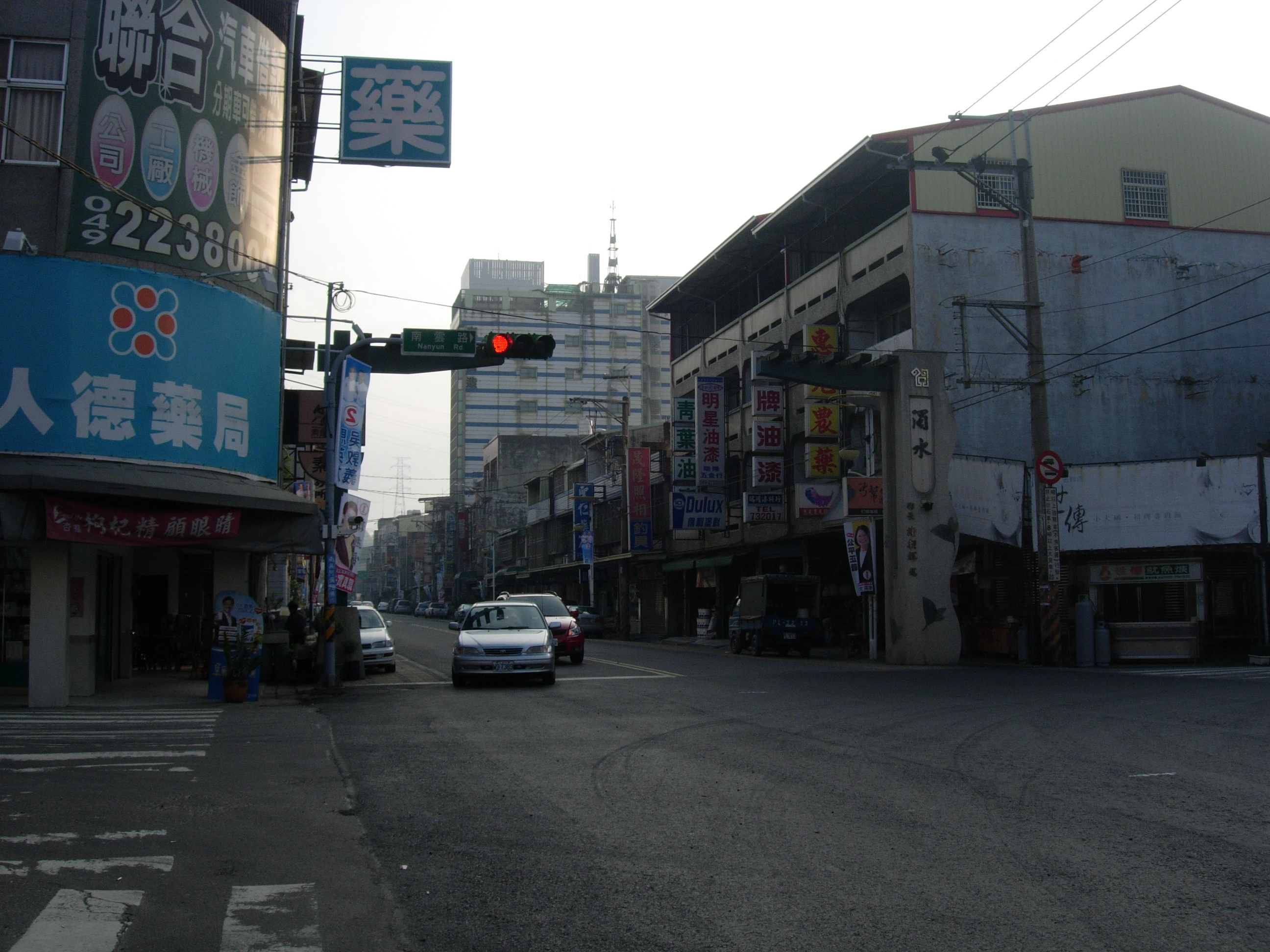 中文（台灣）: 名間市區早晨一景